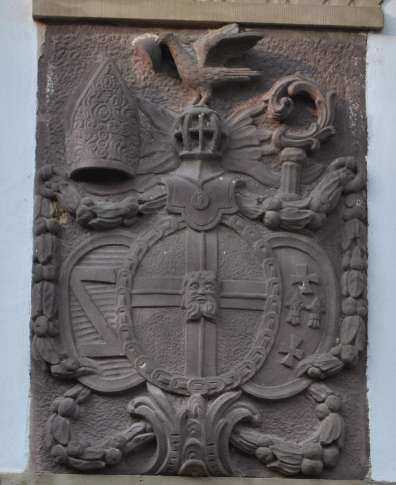 Ehemaliges Prämonstratenserkloster Oberzell, Klostermühle, 1790, Wappen Abt Christoph Kroh. D-6-79-209-55